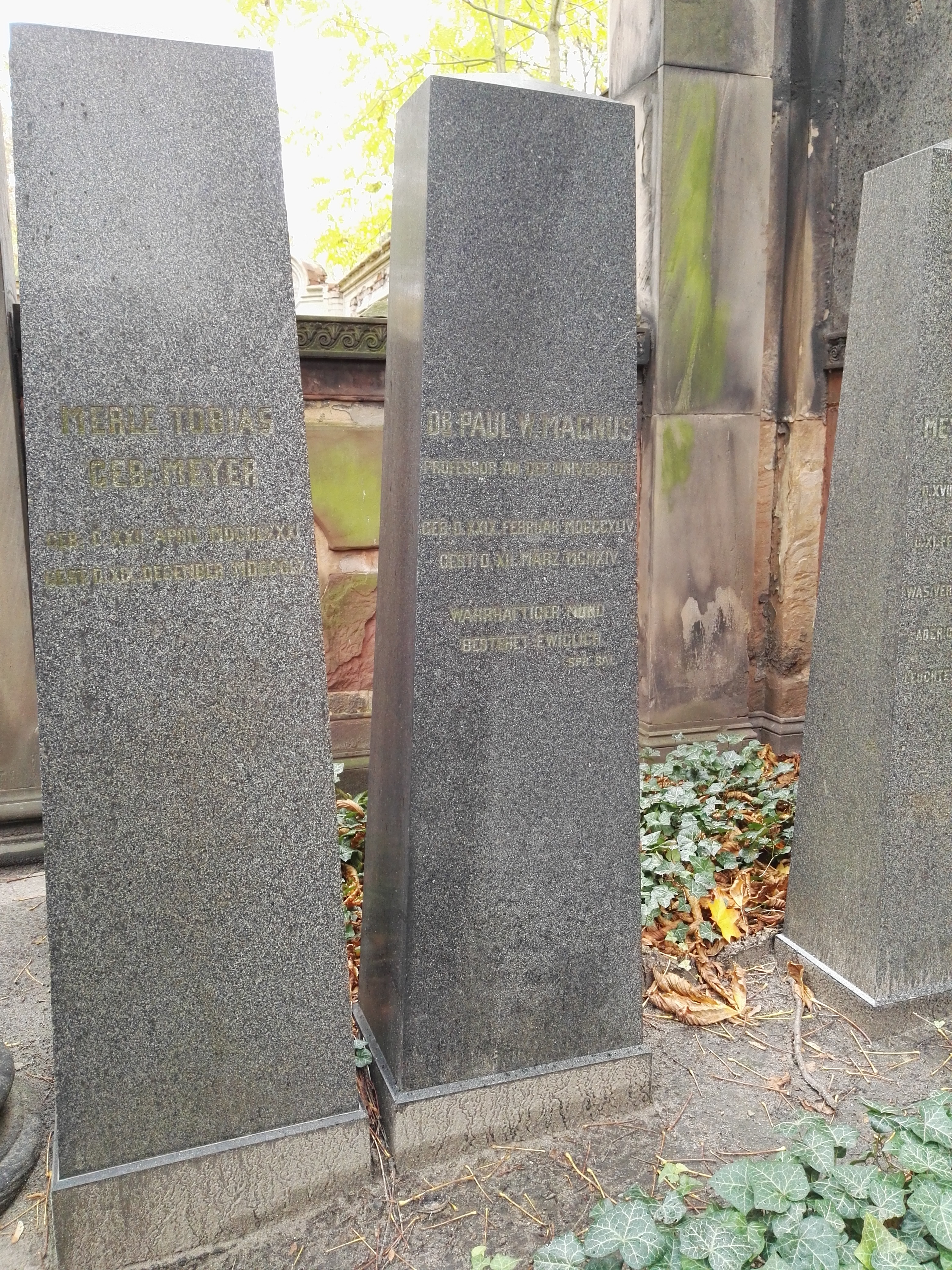 Grab von Paul Wilhelm Magnus auf dem Jüdischer Friedhof Schönhauser Allee in Berlin-Prenzlauer Berg